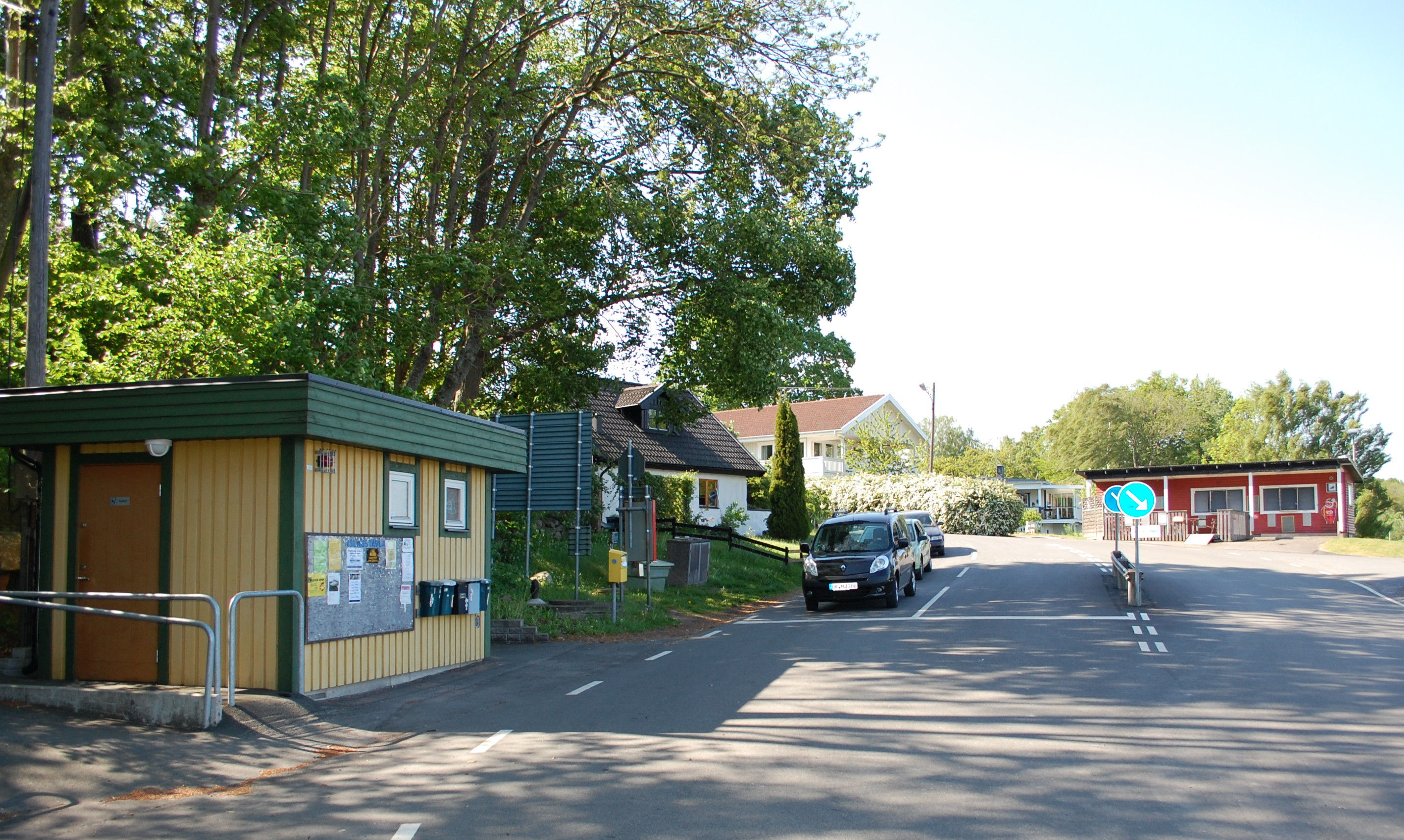 Färhstelle in Barum an der Färe nach Ivö